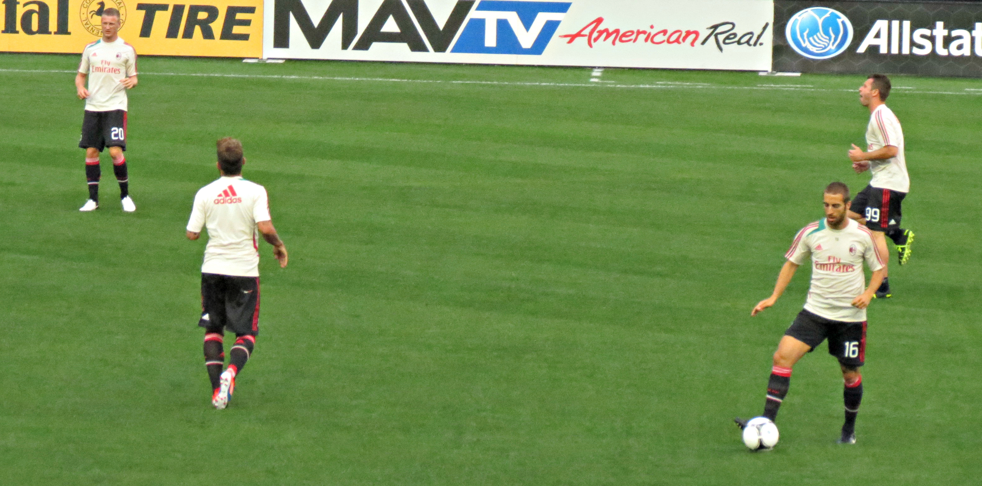 From left to right: Ignazio Abate, Antonio Nocerino, Mathieu Flamini, Antonio Cassano.